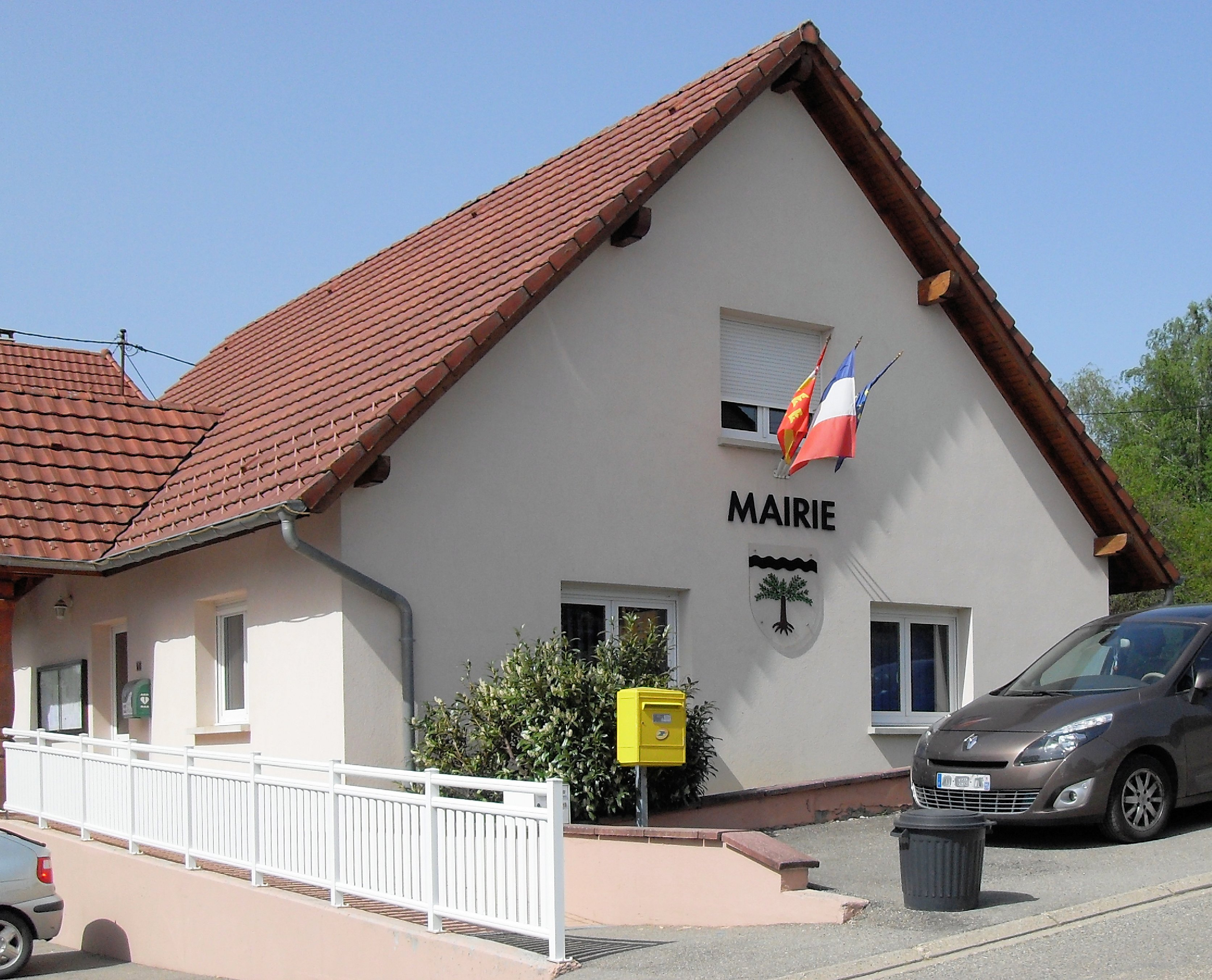 La mairie d'Eteimbes